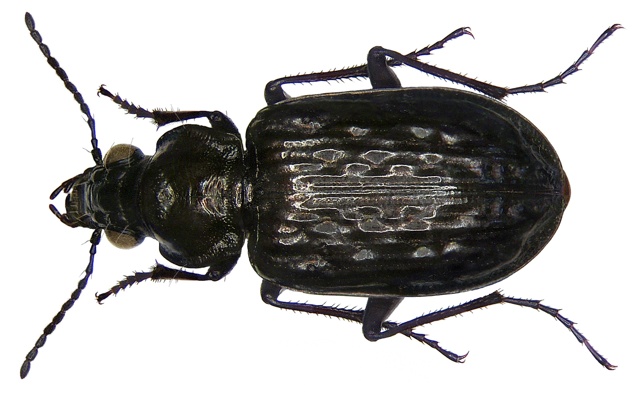 Familie: Carabidae Größe: 10-13 mm Verbreitung: Europa Fundort: Germania, Hessen, Hanau leg. K.Hofmann; det. H.Tuchert Foto: U.Schmidt, 2008